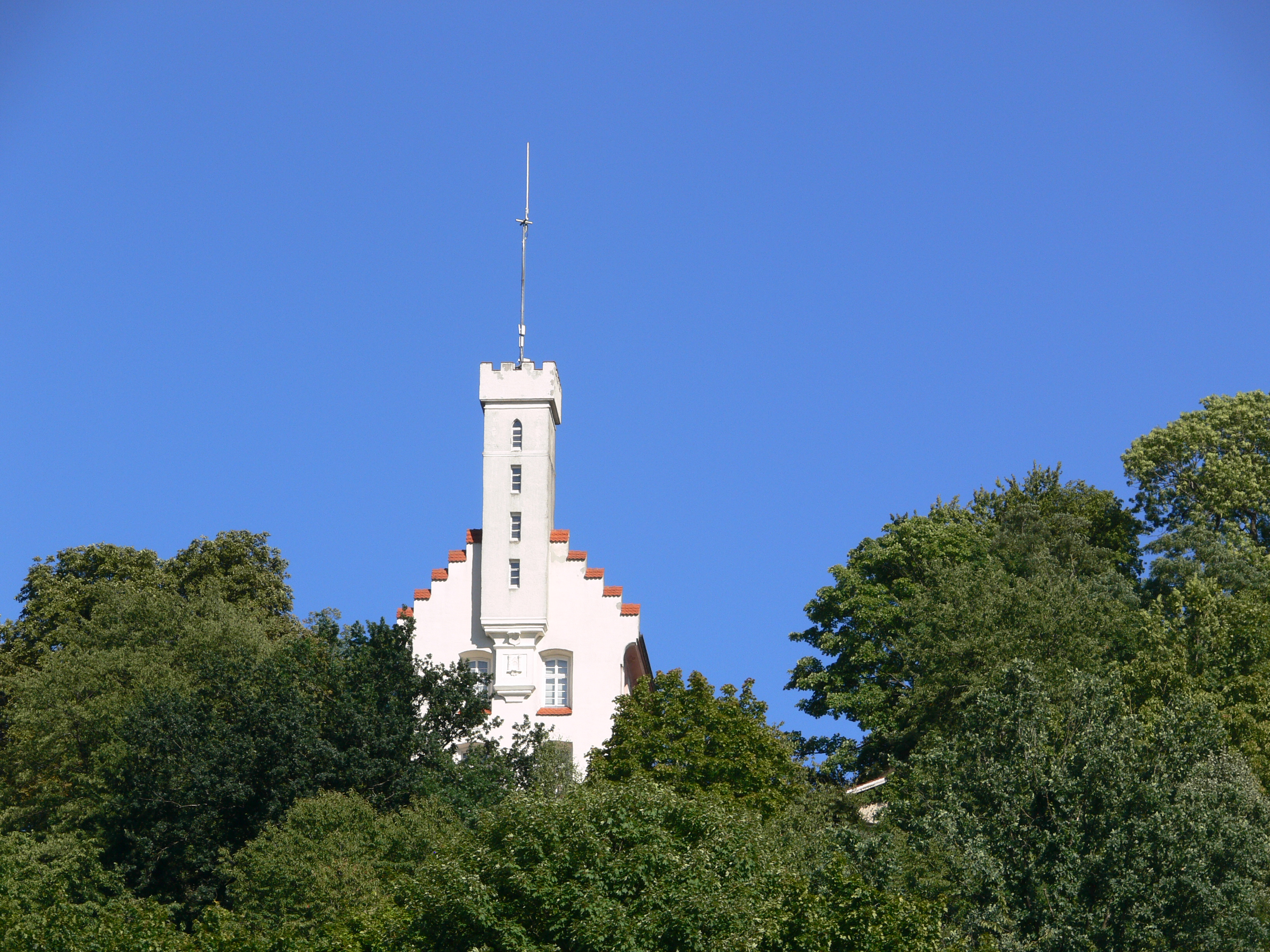 Ravensburg Veitsburg, gesehen von der Rudolfstraße